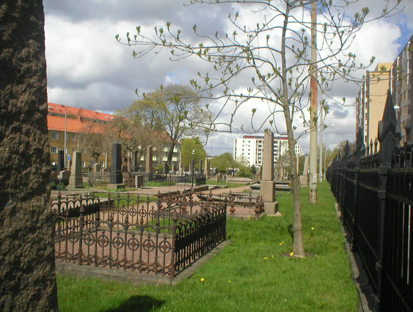 Foto av Djurgårdskyrkogården, Majorna, Göteborg, taget av Per Johansson 2005.